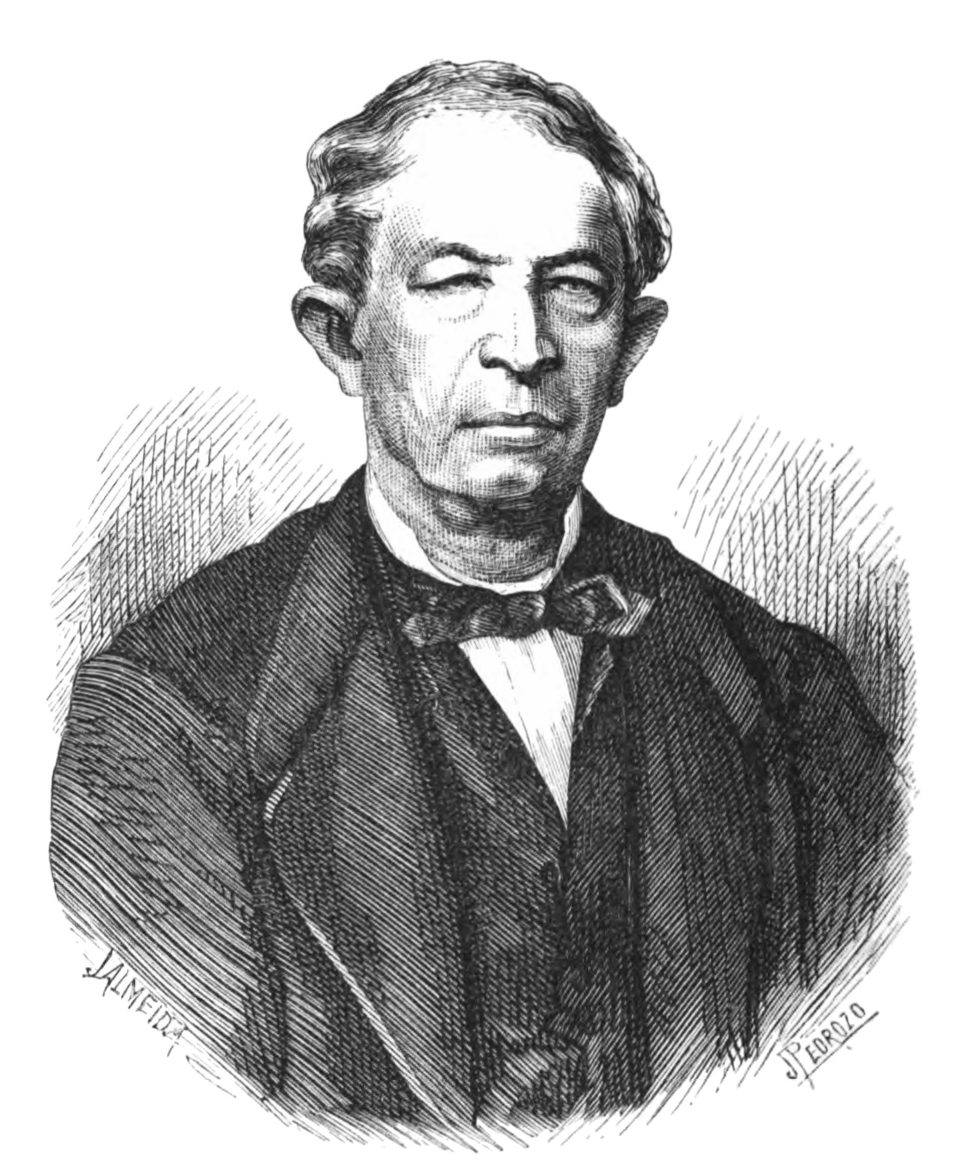 Porträt Sotero dos Reis (1800-1871), brasilianischer Philologe, Romanist, Schriftsteller, Übersetzer, Journalist